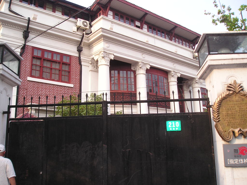 摘要多伦路210号